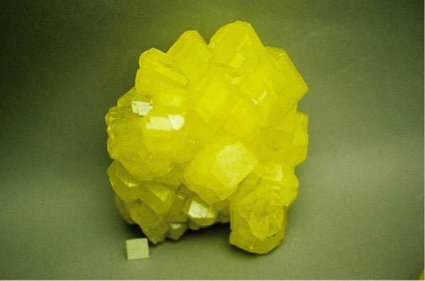 A sulfur crystal.